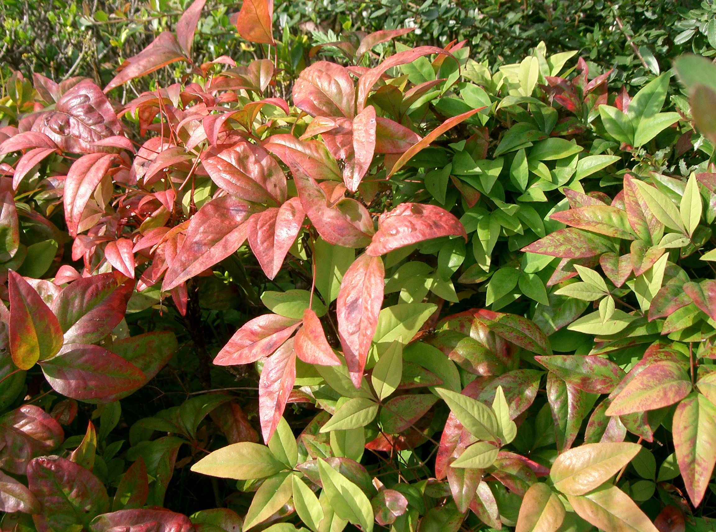 Nandina domestica cv. Otafukunanten